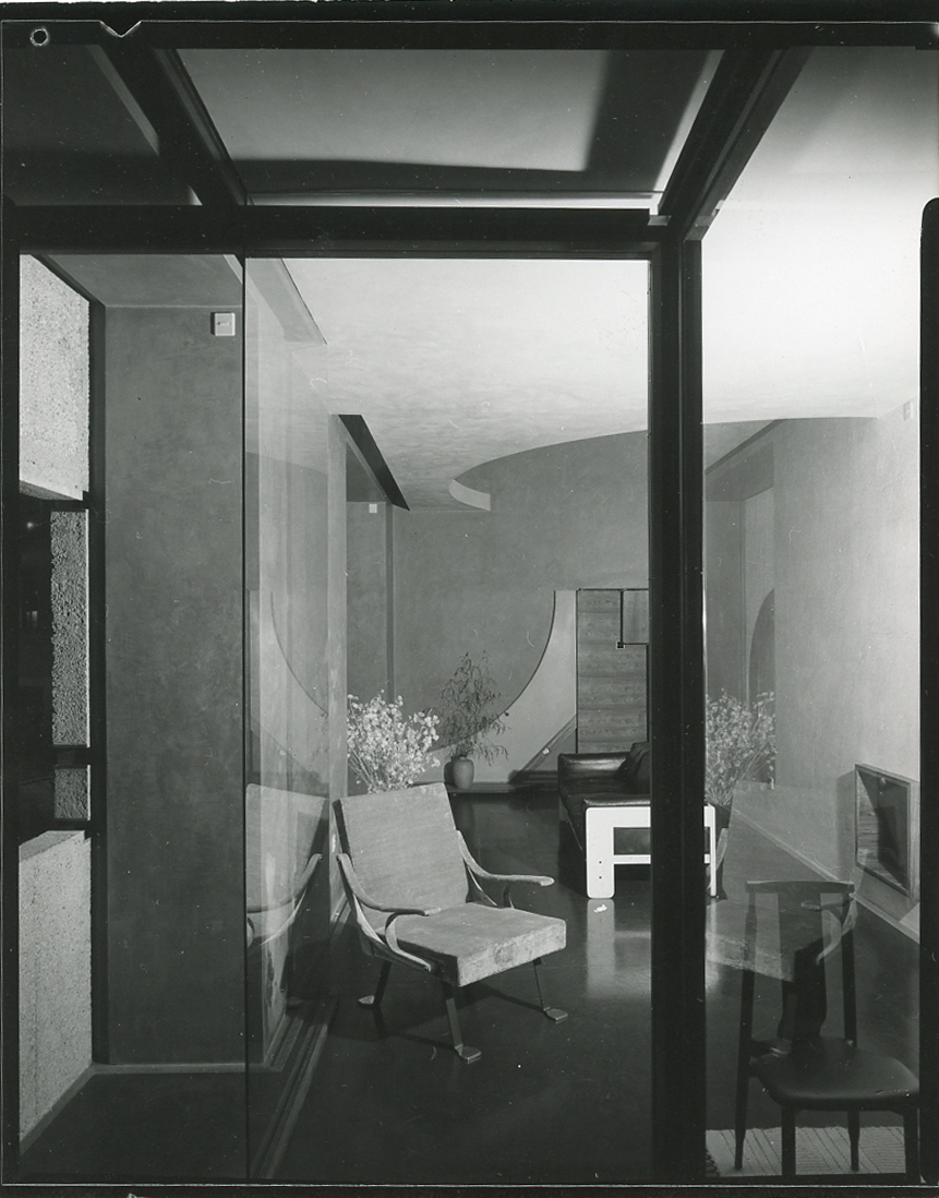 Servizio fotografico : Bologna, 1963 / Paolo Monti. - Fototipi: 4 : Positivo b/n, gelatina bromuro d'argento/ carta, provino a contatto da pellicola 10x12. - ((Serie costituita da 4 provini a contatto identificati con i nn.: 44301, 44312, 44316, 44318. La suddetta serie è contenuta nella scatola dei contatti identificata con il n. 05; sul coperchio iscrizione manoscritta a pennarello: "Contatti/ archit.". - Fonte: Rubrica di Paolo Monti: Archivio fino 1-4-1961/ 31-3-1963 (1961-1963), presso Archivio Paolo Monti